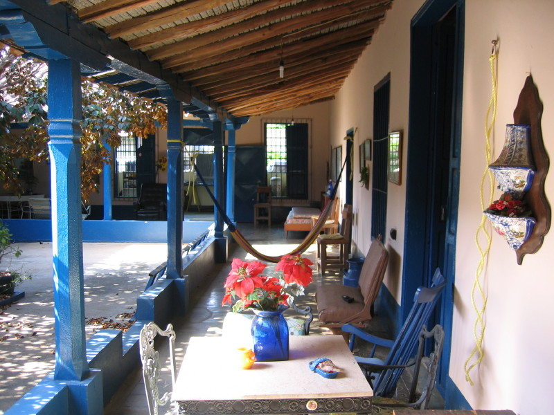 Zaguán y patio interior de casa colonial, Aragua de Barcelona, Venezuela.